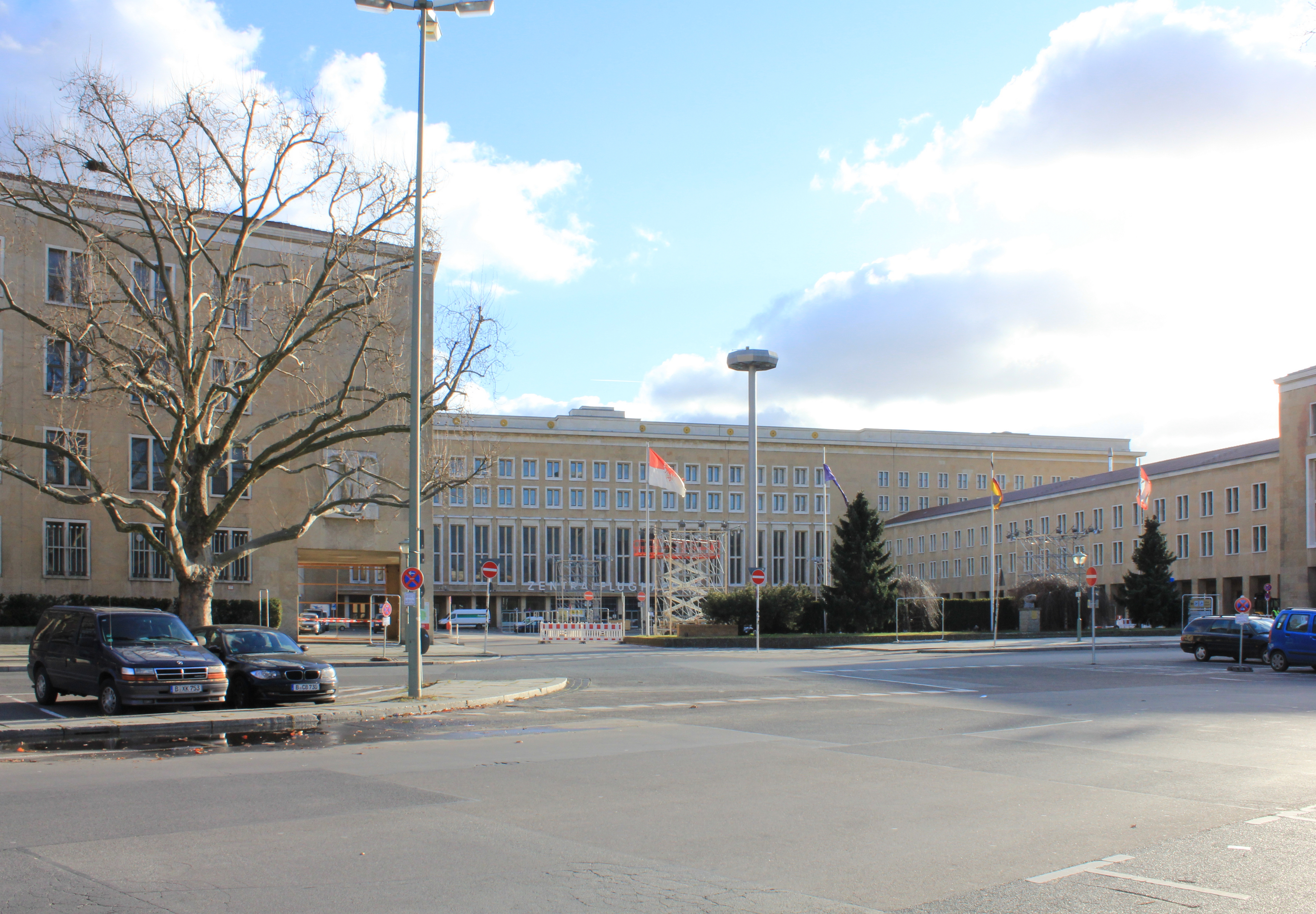 Flughafen Tempelhof 1936-39 von Ernst Sagebiel